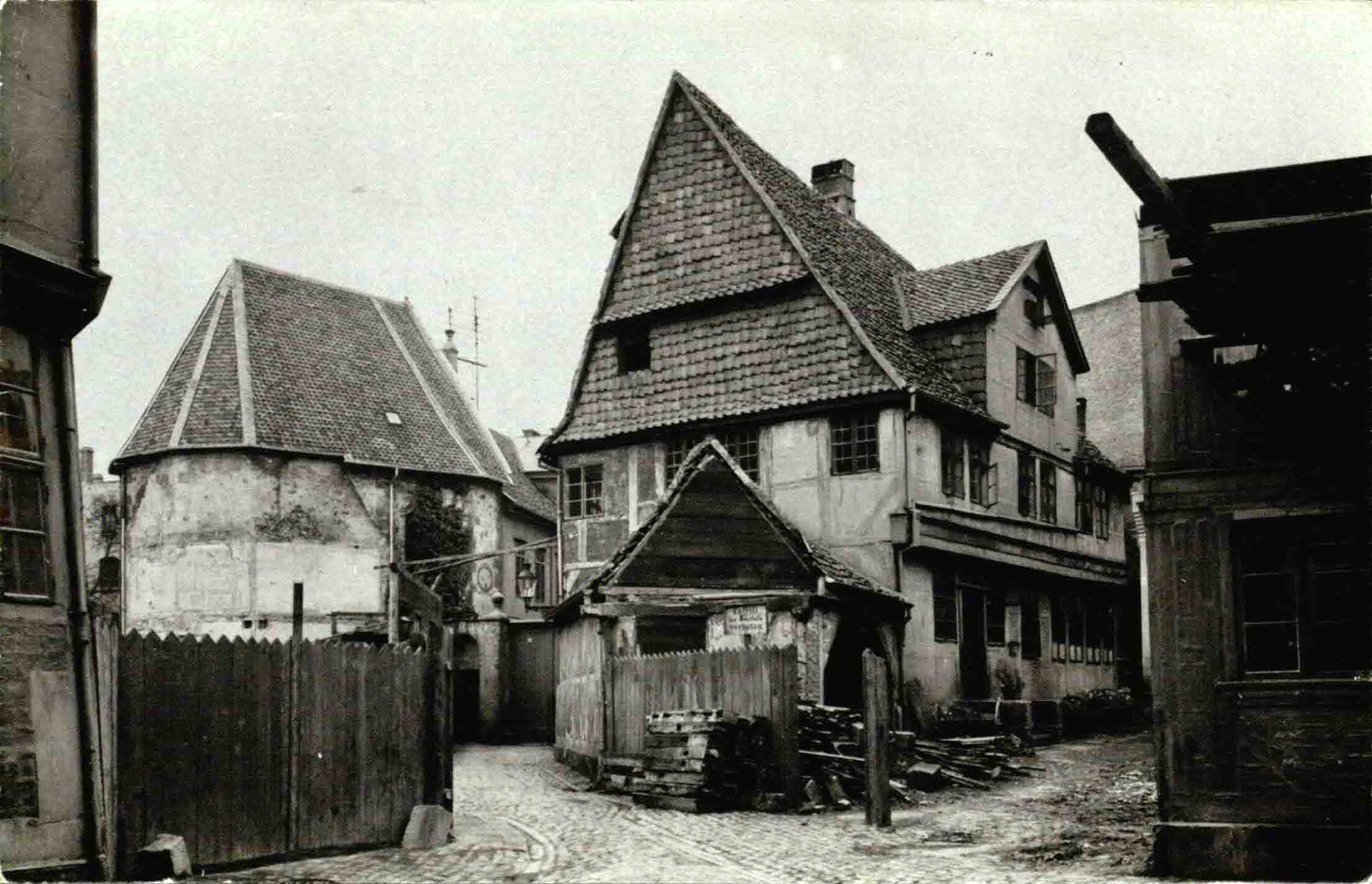 Braunschweig, Maria-Magdalenen-Kapelle und nähere Umgebung 1905